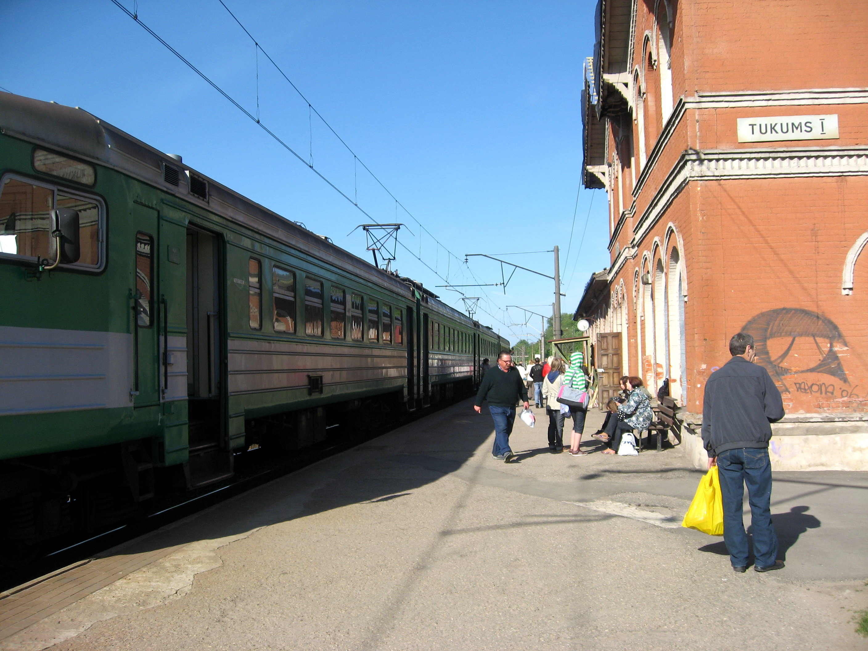 Tukums, vlak na nádraží Tukums I